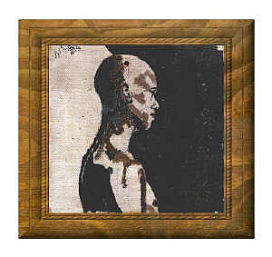 "Autoportree 1985". Foto autor: Sven Senka 2000